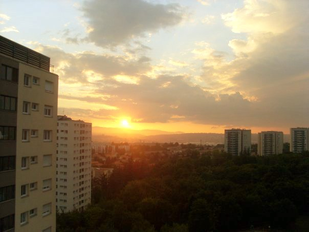 Coucher de soleil depuis les Minguettes, Vénissieux